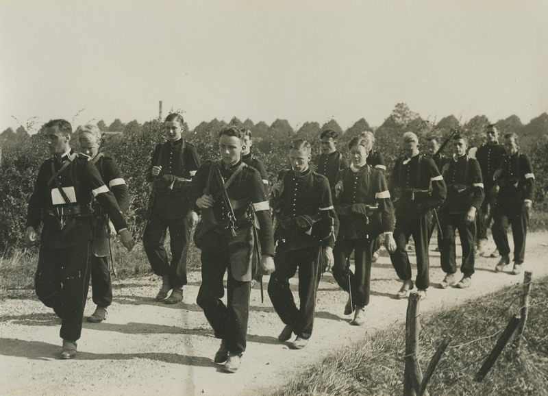 De Leidse Studenten Weerbaarheidsvereniging "Pro Patria" onder leiding van de elnt J.A.G. baron de Vos van Steenwijk op het parcours van 50 km. tijdens de 21e Vierdaagse.